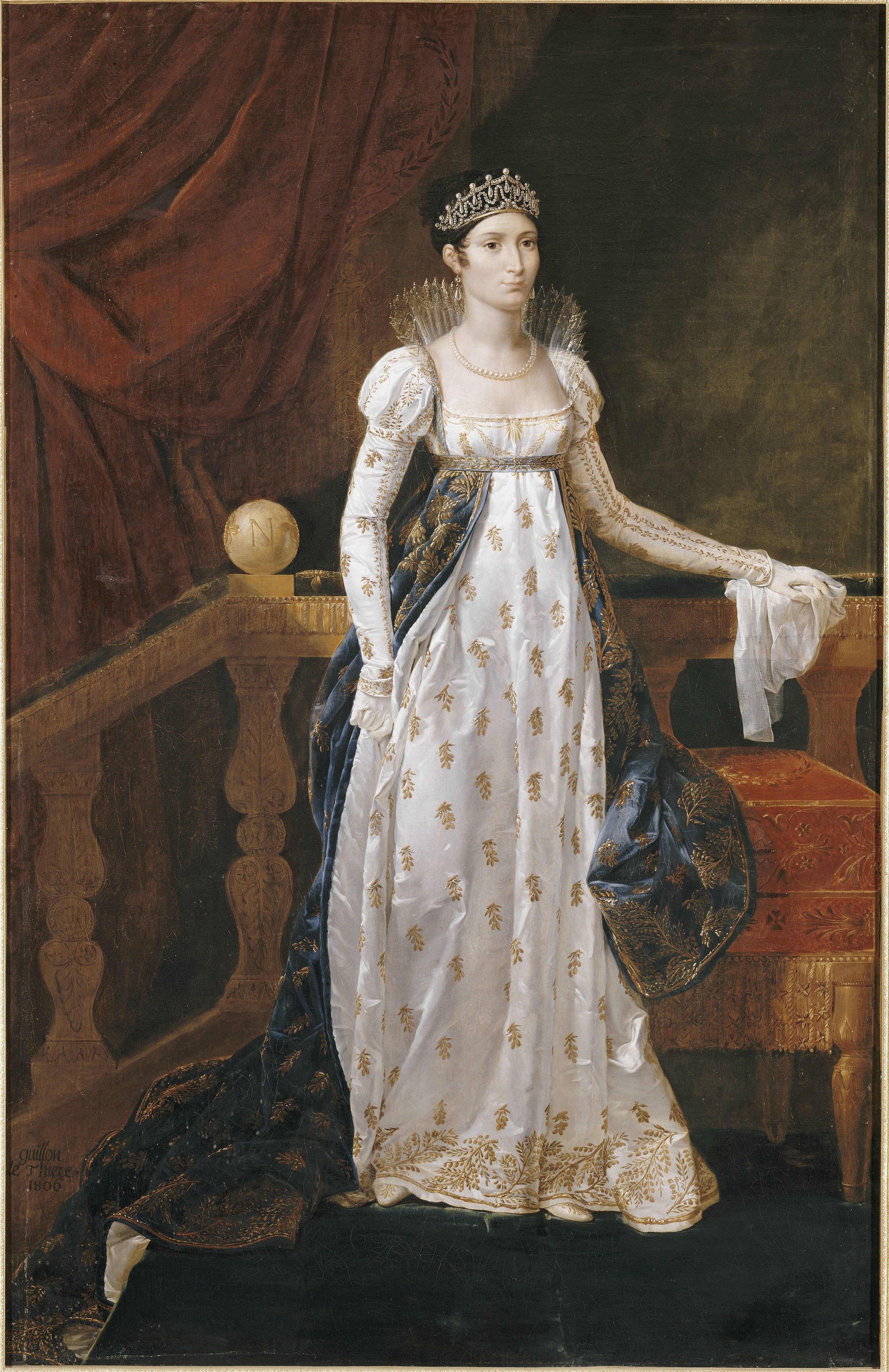 Elisa Bonaparte-Baciocchi, grande duchesse de Toscane